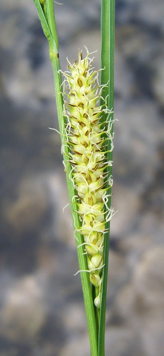 Carex rostrata (pl. Turzyca dzióbkowata), habitat: Tatra Mountains, Dolina Gąsienicowa, Staw Litmanowy Gąsienicowy